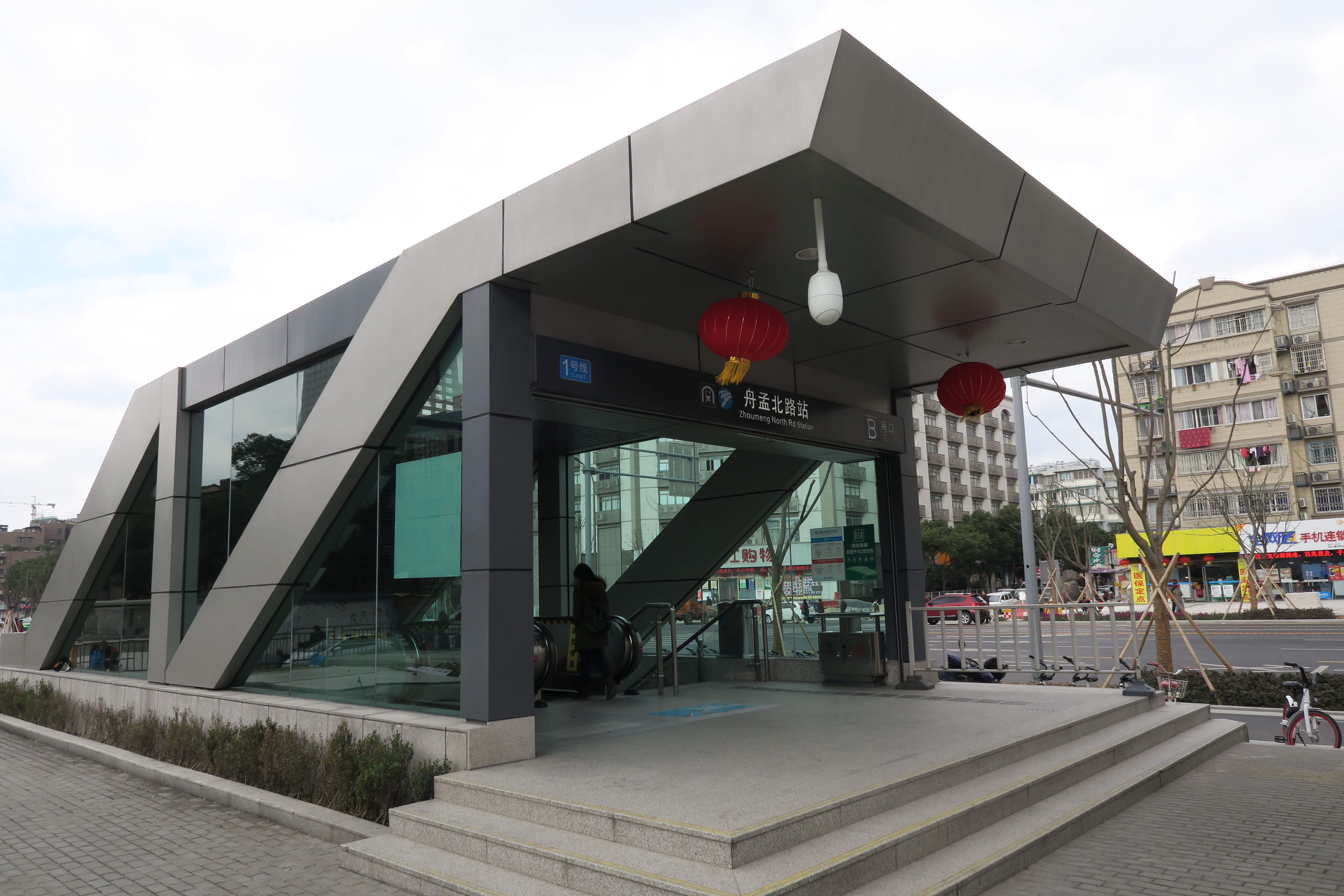 舟孟北路站C口